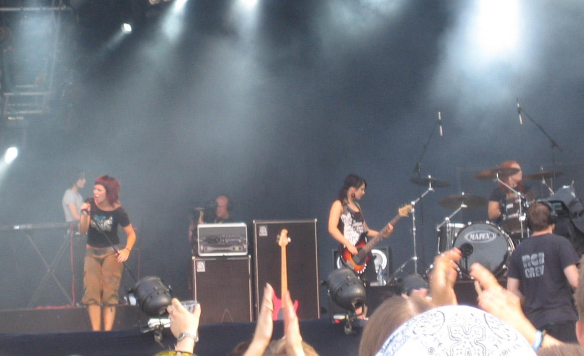 Tiktak (tik'n'tak in english), Provinssirock 2006, Finland.